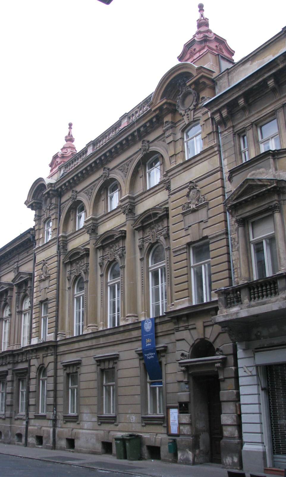 Muzička akademija u Zagrebu